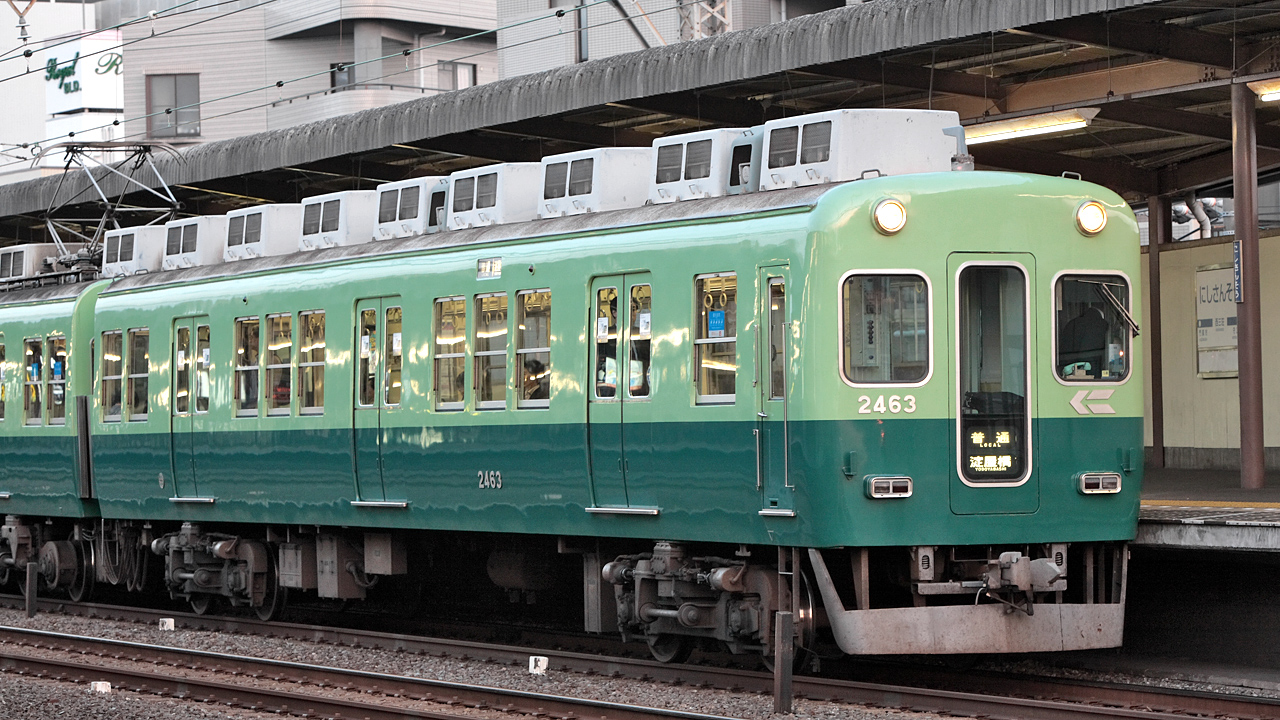 Keihan 2400 Series EMU